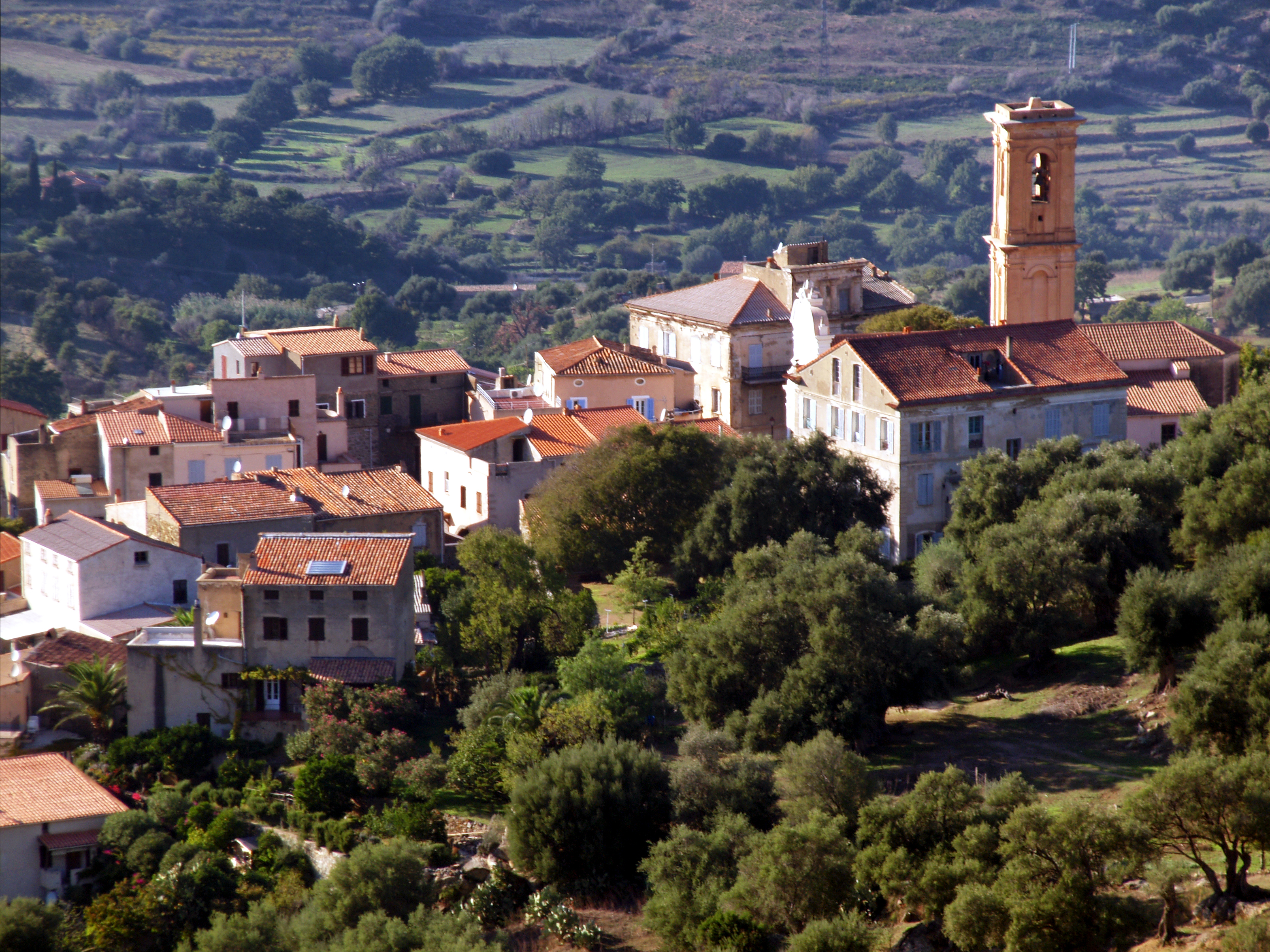 Aregno, Balagne (Haute-Corse) - Les toits du village dominé par le clocher de son église paroissiale Saint-Antoine-Abbé.